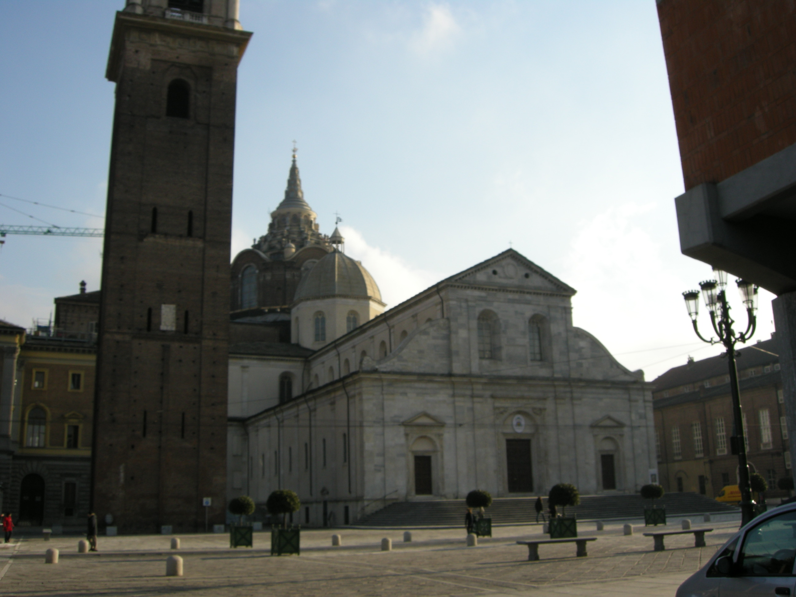 Torino, duomo